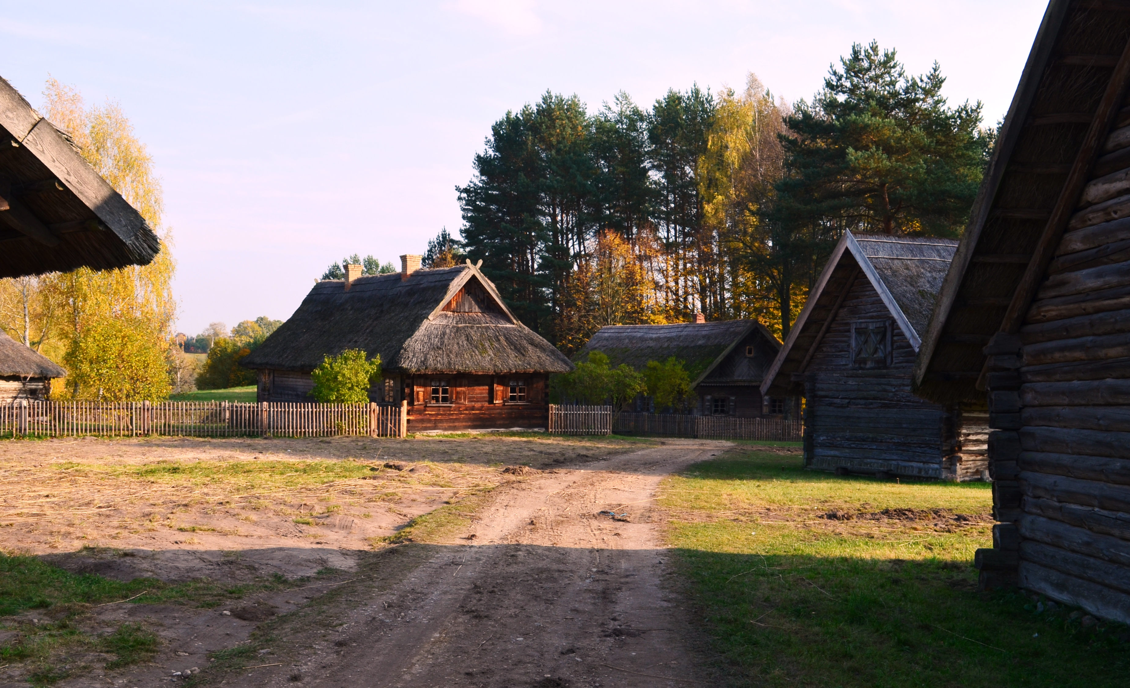 Dzūkų sodyba, Rumšiškių muziejus